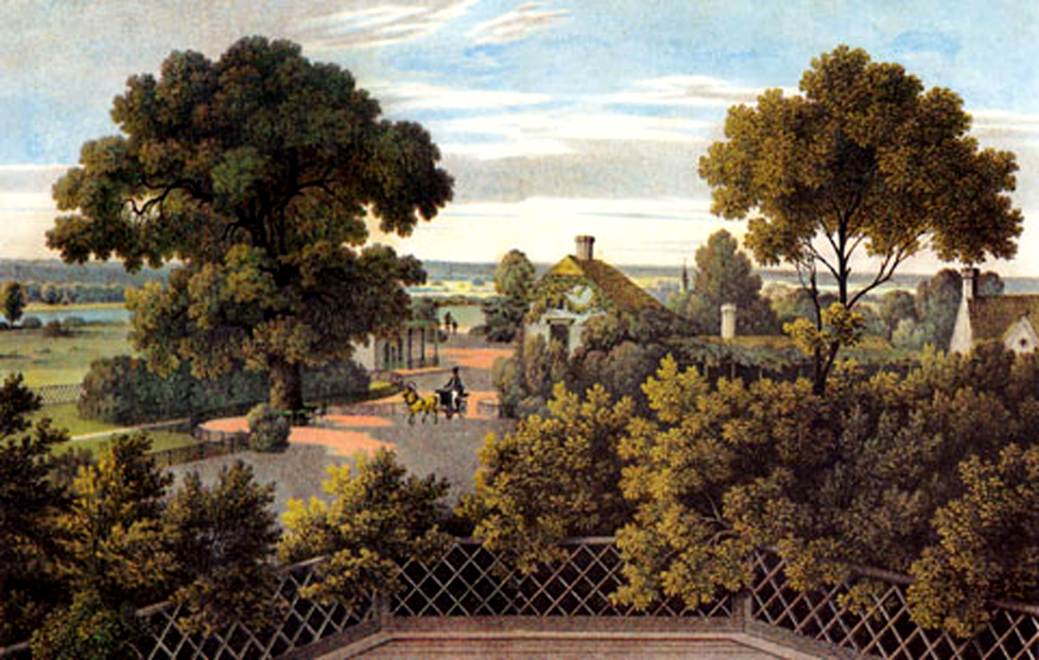 Park Muskau Blick vom englischen Haus